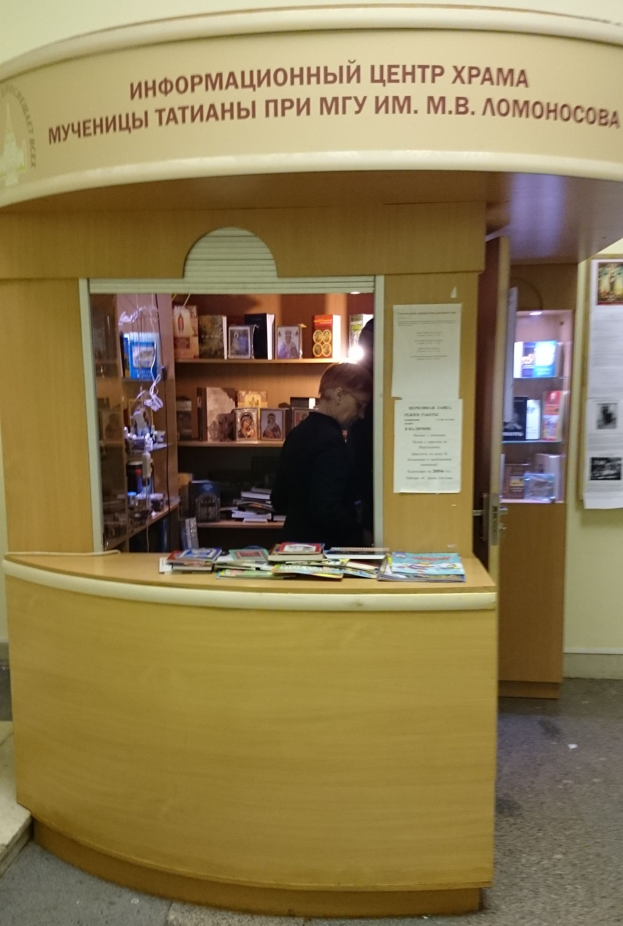 Киоск (информационный центр) православного храма, торгующий религиозной литературой и предметами культа на территории МГУ (Главное здание, 2016)